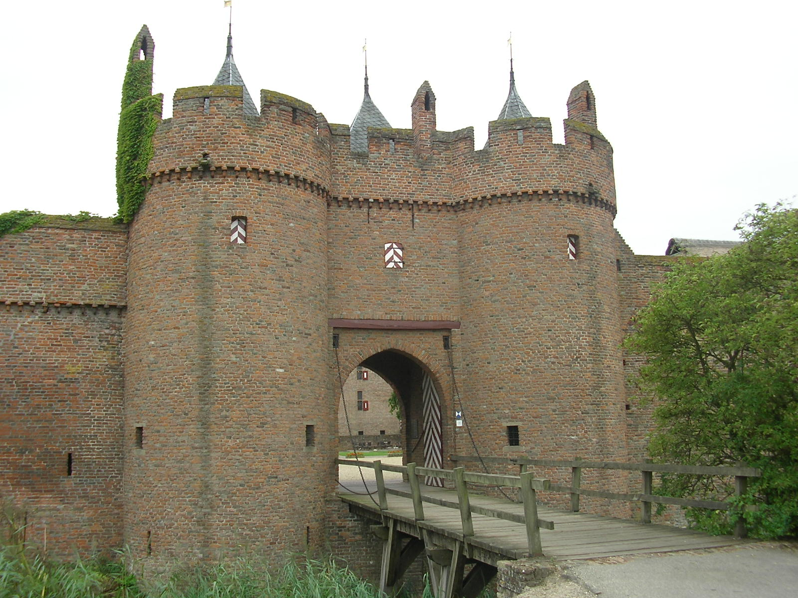 foto gemaakt door wikipedia vrijwilliger gijsevers, gemaakt op 08-08-06, poortgebouw kasteel Doornenburg